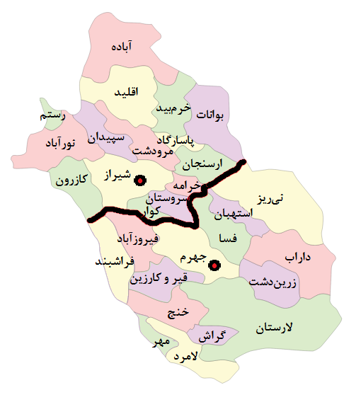 نقشه استان های فارس شمالی و جنوبی فایل اصلی File:Fars.svg